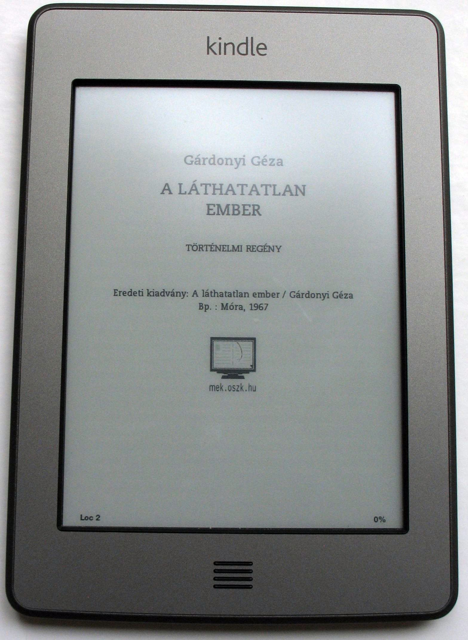 Amazon Kindle Touch Wifi